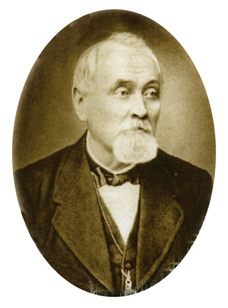 Porträt Hermann Schulze-Delitzsch 1808-1883